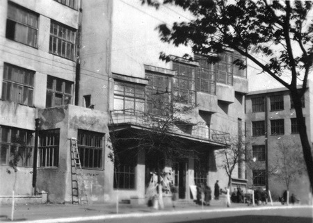 Разрушенный 3-й корпус индустриального института